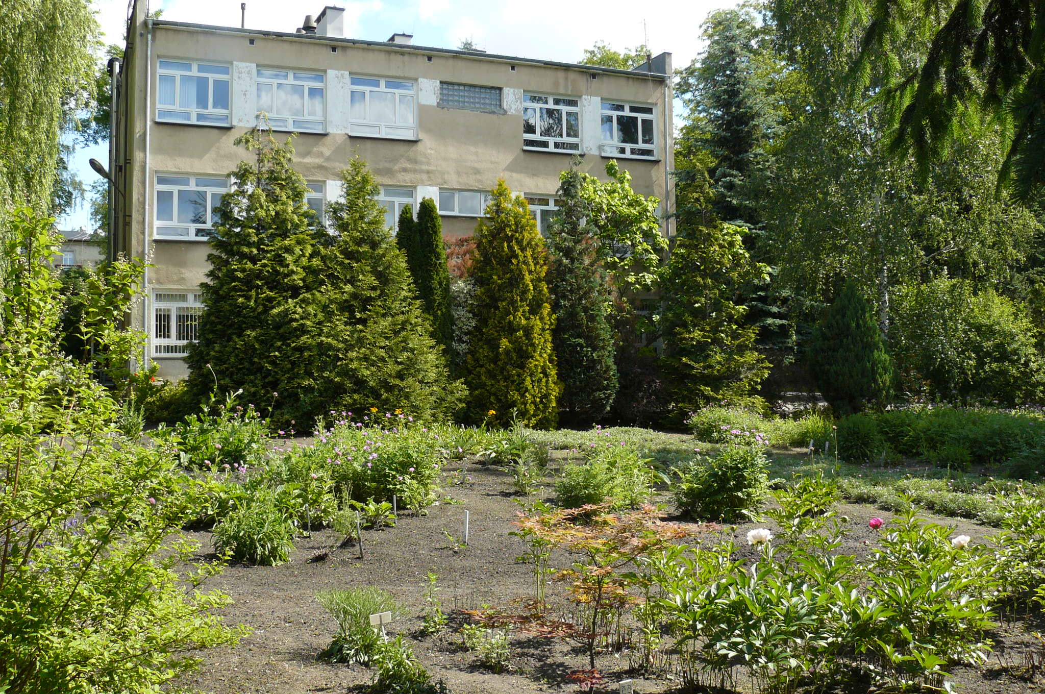 Zwiedzanie Ogrodu Farmakognostycznego Uniwersytetu Medycznego w Poznaniu, zorganizowane przez Katedrę Naturalnych Surowców Leczniczych i Kosmetycznych Uniwersytetu Medycznego w Poznaniu oraz Stowarzyszenie Absolwentów Uniwersytetu im. Adama Mickiewicza w Poznaniu. 2.6.2012r. Budynek dydaktyczny.